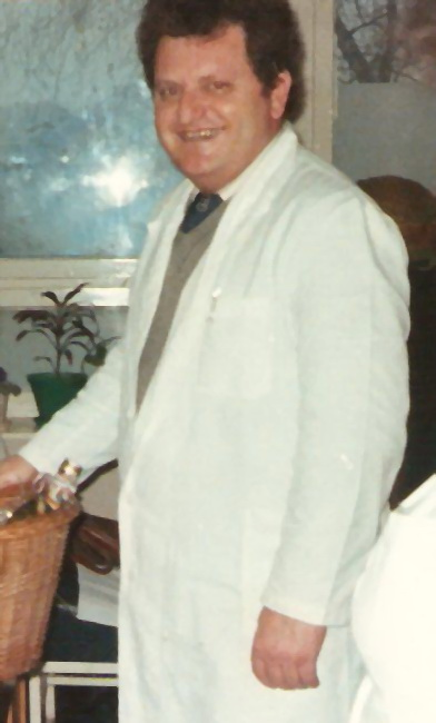 Prim.Dr.Miodrag Erić